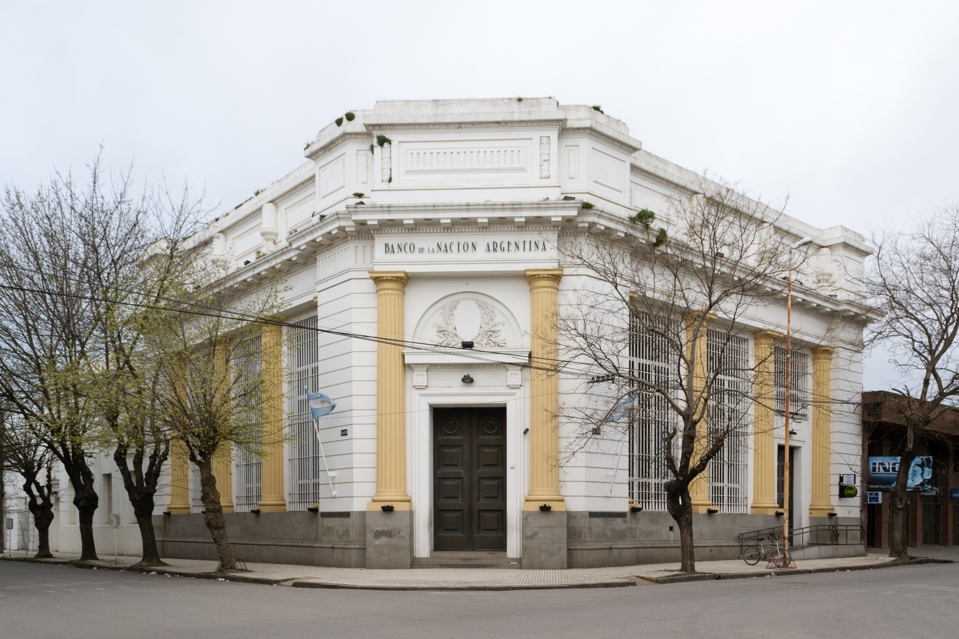 Conjunto Plaza Libertad